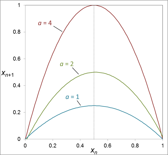 二次関数としてのロジスティック写像、パラメータaによる曲線の変化